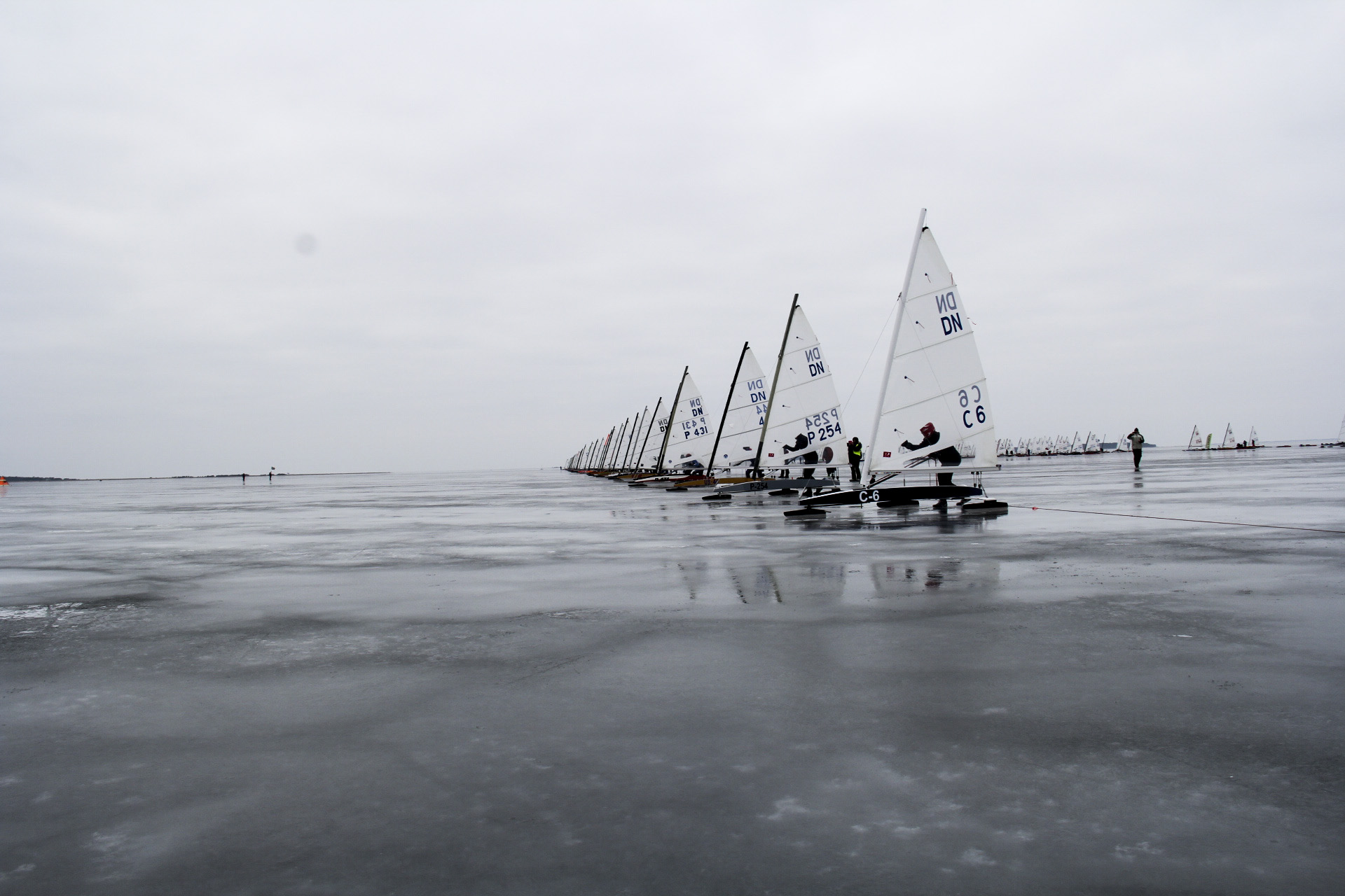 DN Rajt